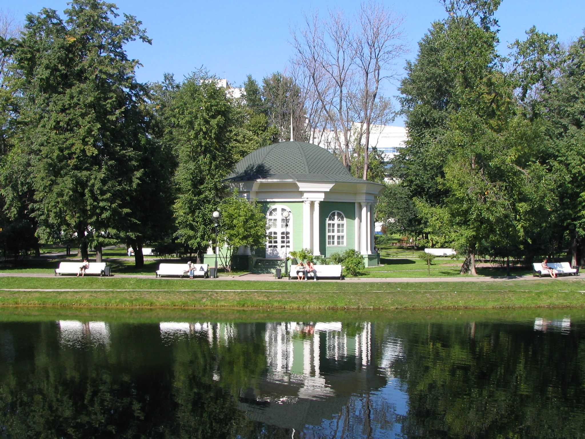 Павильон в Екатерининском парке (Москва).